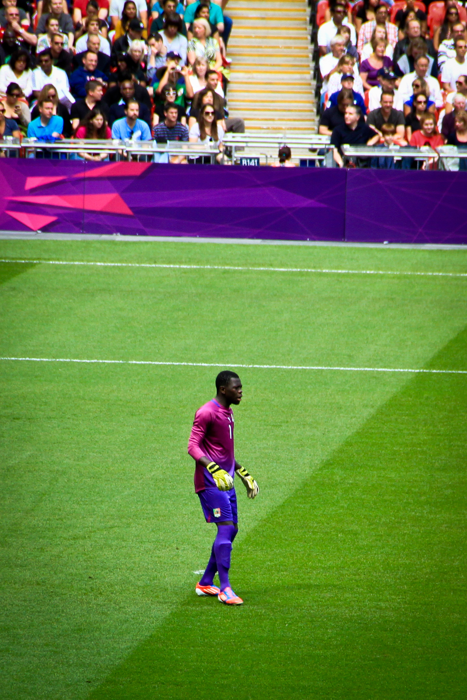 Ousmane Mané, goalkeeper for Senegal.